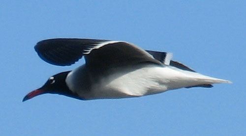 Weißaugenmöwe (Ichthyaetus leucophthalmus)